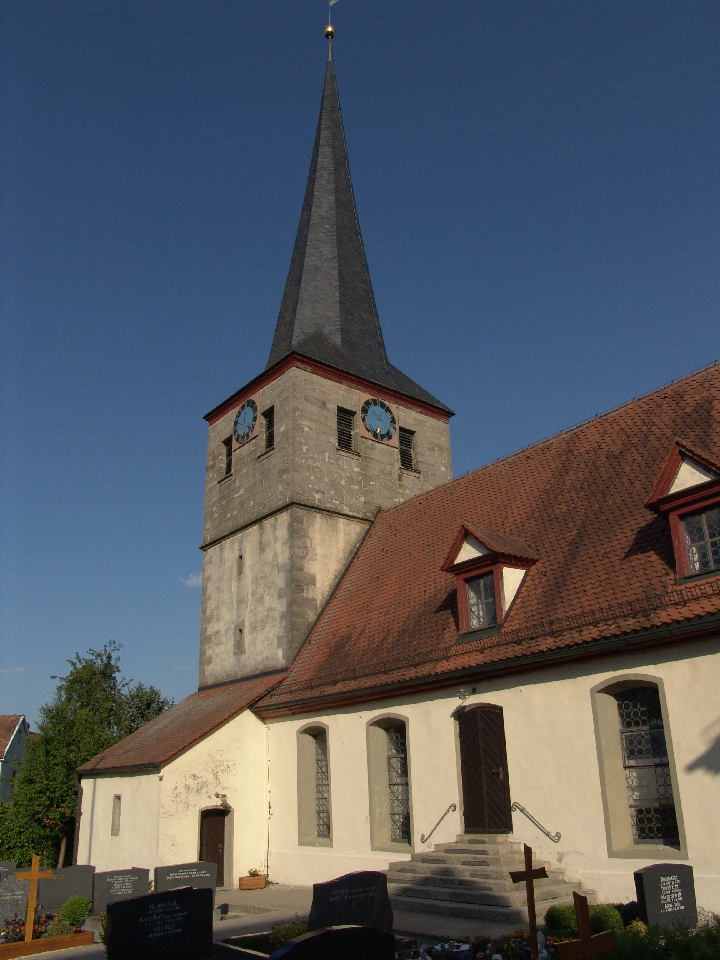 evang.-luth. Kirche St. Nikolaus und Peter in Oberhöchstädt